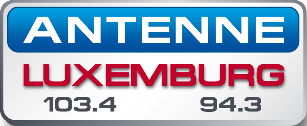 Logo von Antenne Luxemburg